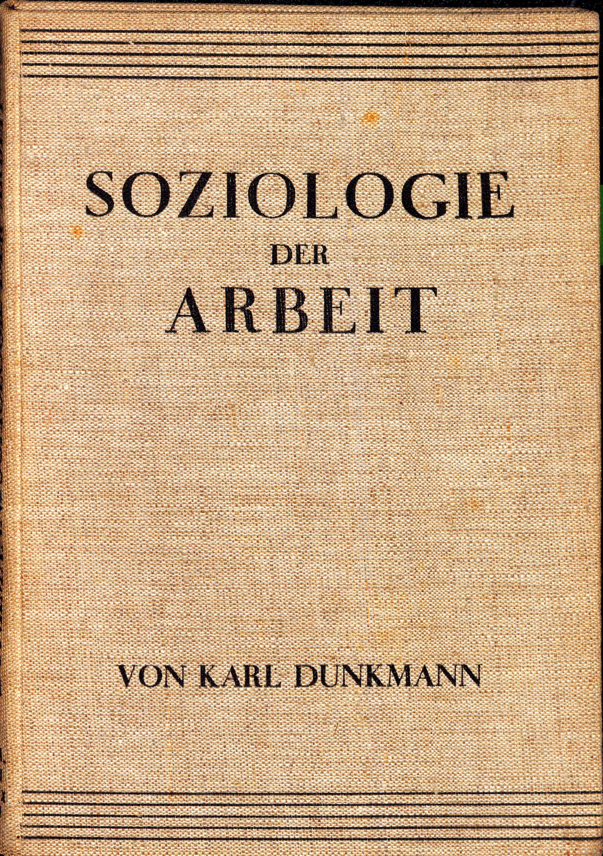 Karl Dunkmann Soziologie der Arbeit 1933 Einband